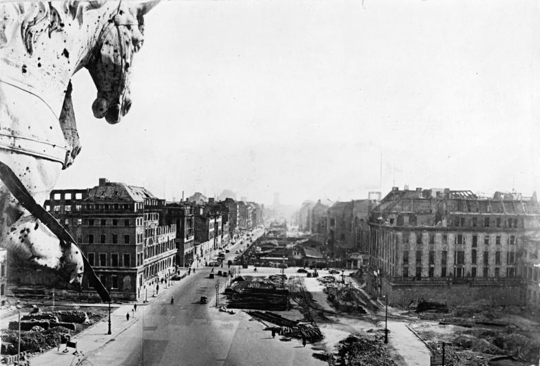 Berlin, Unter den Linden, Ruinen, Trümmer Zentralbild 23.3.1950 Berlin 1950 UBz: Blick vom Brandenburger Tor auf Unter den Linden.